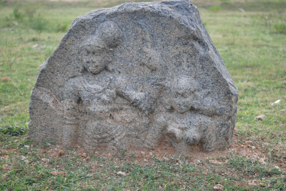 தேவிகாபுரம் தேவரடியார் குளம் பின்புறம் உள்ள சதிக்கல். 14 ஆம் நூற்றாண்டைச்சேர்ந்தது.